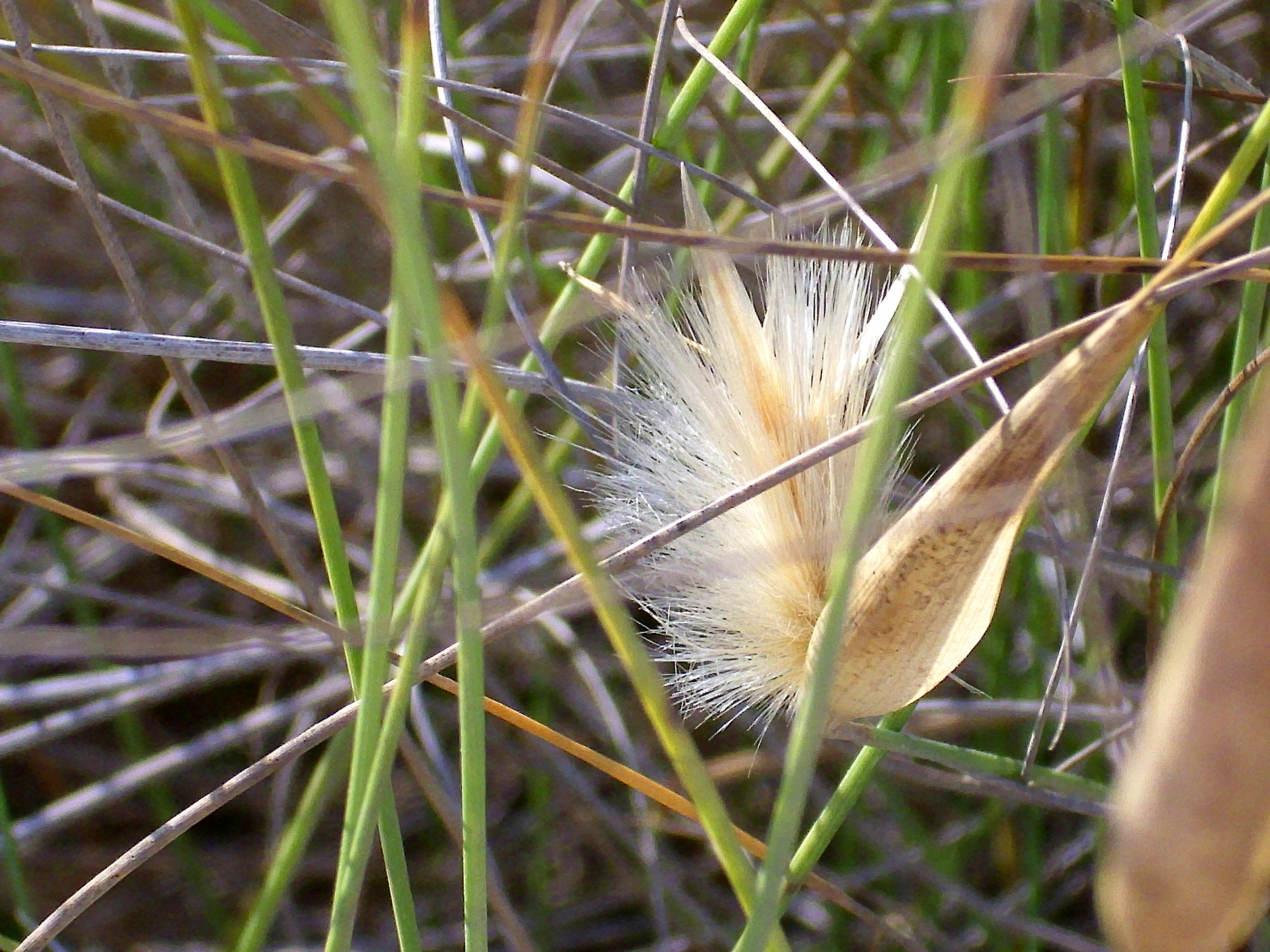 Lygeum_spartum flower closeup, La Mata, Torrevieja, Alicante, Spain